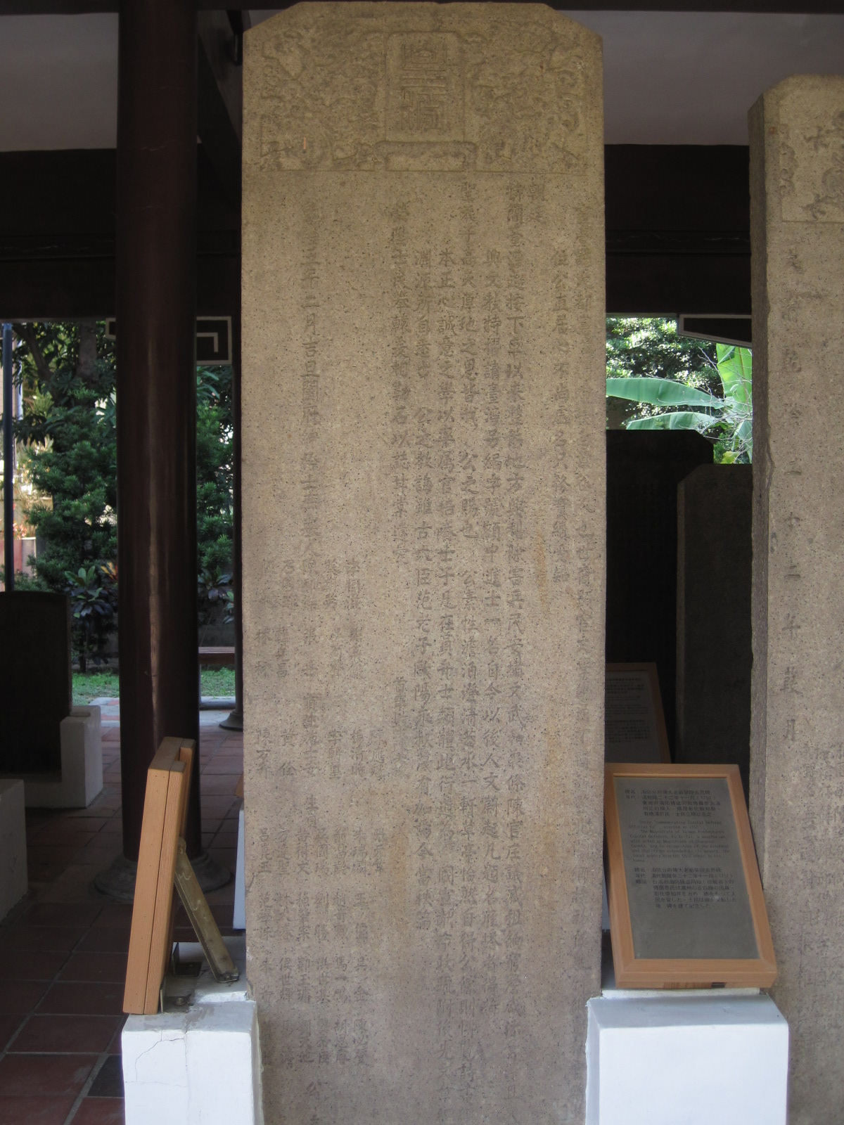 臺灣臺南市南門公園碑林石碑之一